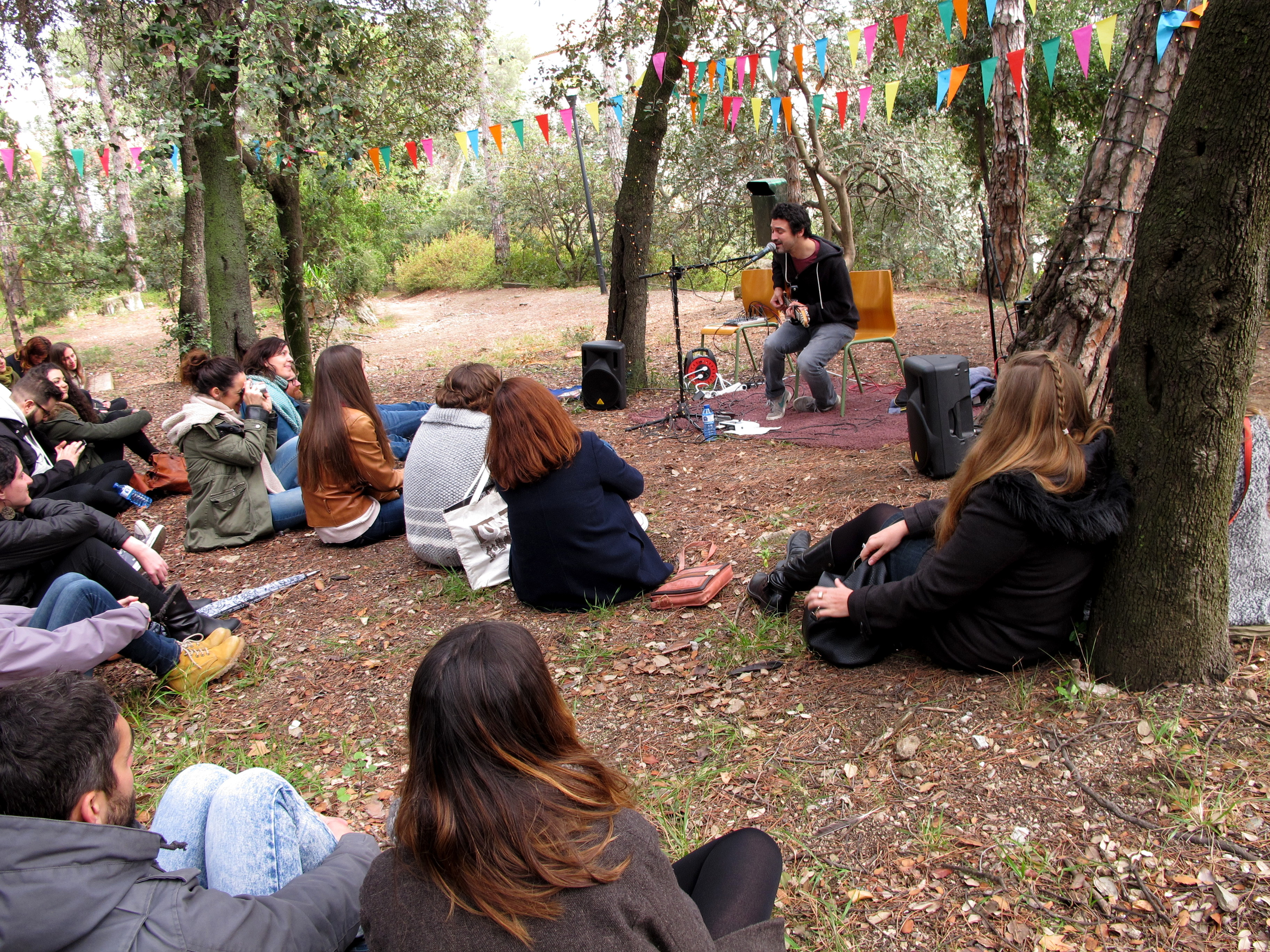 Nico Roig a Indies Keeping Secrets - Secret Festival 2016.